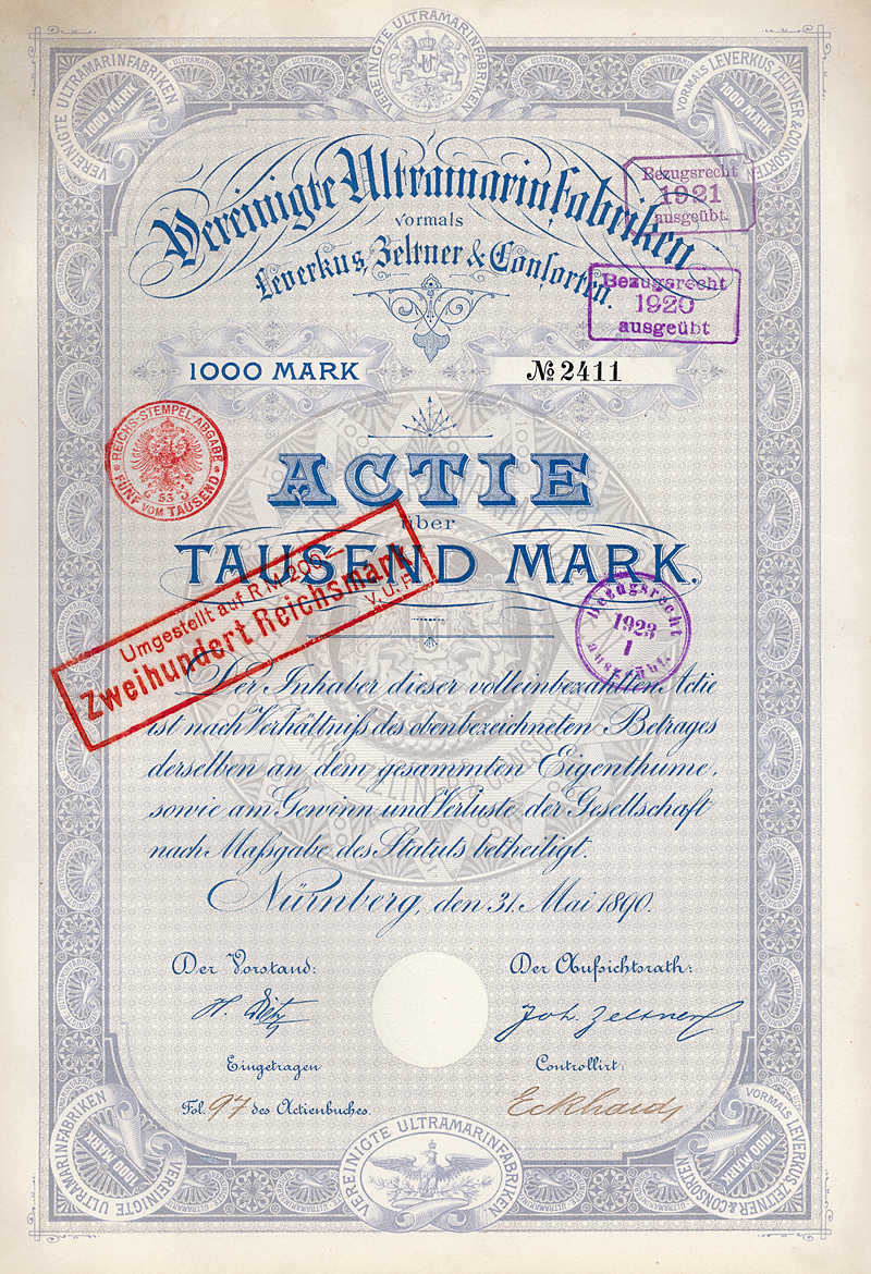 Aktie über 1000 Mark der Vereinigten Ultramarinfabriken vorm. Leverkus, Zeltner & Consorten vom 31. Mai 1890